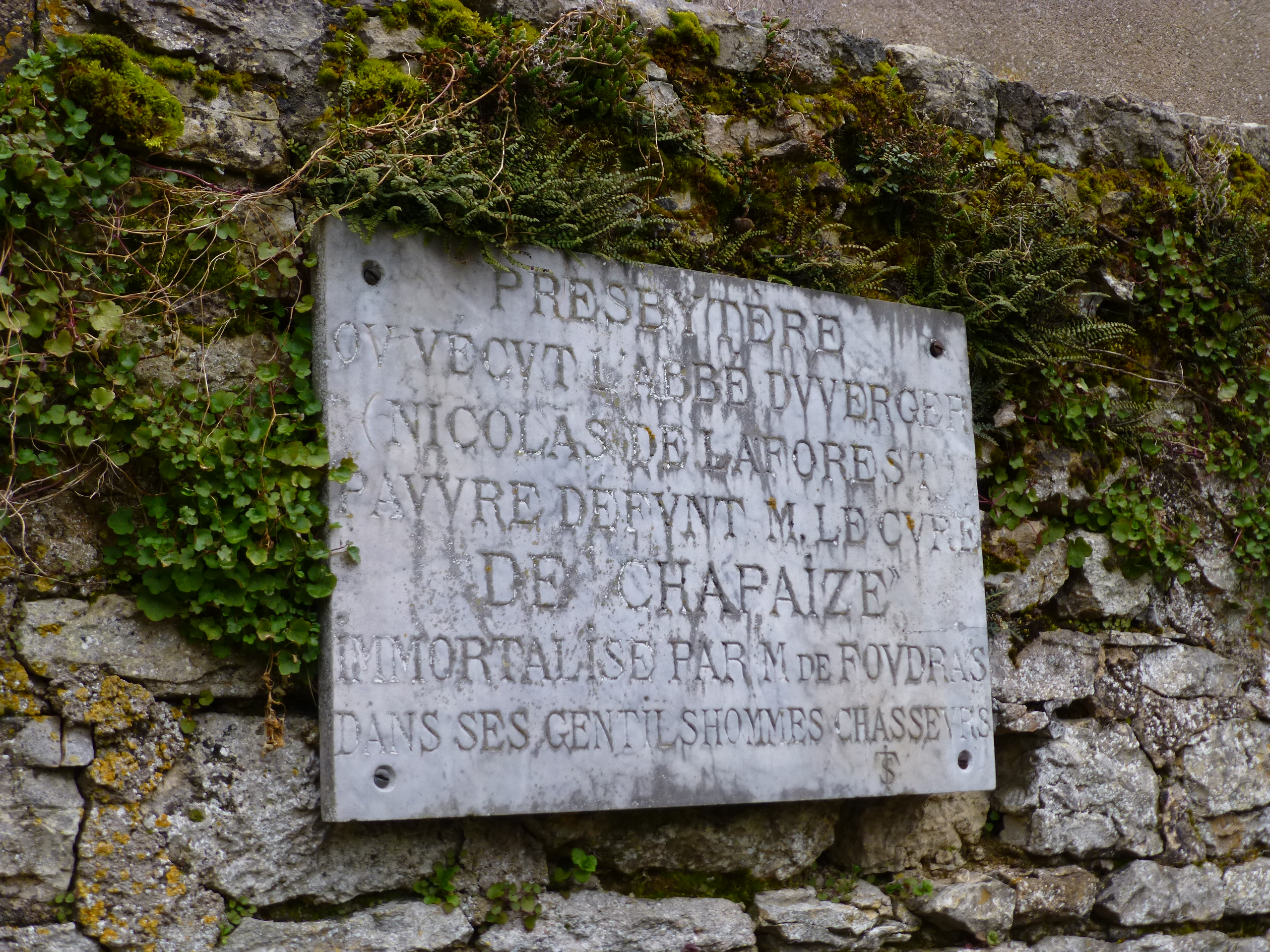 Plaque commémorative devant le Presbytère de Chapaize (71) "Presbytère ou vécut l'abbé Duverger (Nicolas Laforest) Pauvre défunt M. le Curé de Chapaize immortalisé par M de Foudras dans ces gentilshommes chasseurs"